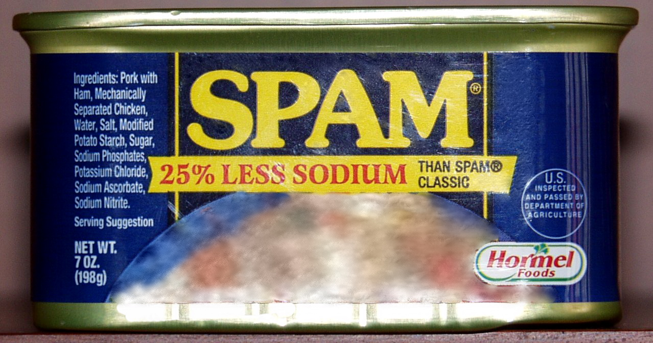 Zu sehen ist eine 200g-Dose SPAM der Firma Hormel Hinweis: Fotografische Abbildung auf dem Etikett per Nachbearbeitung entfernt. Zur Lizensierung: Das Photo von der Dose ist GFDL, die Schriftzüge auf der Dose selbst PD wegen mangelnder Schöpfungshöhe.